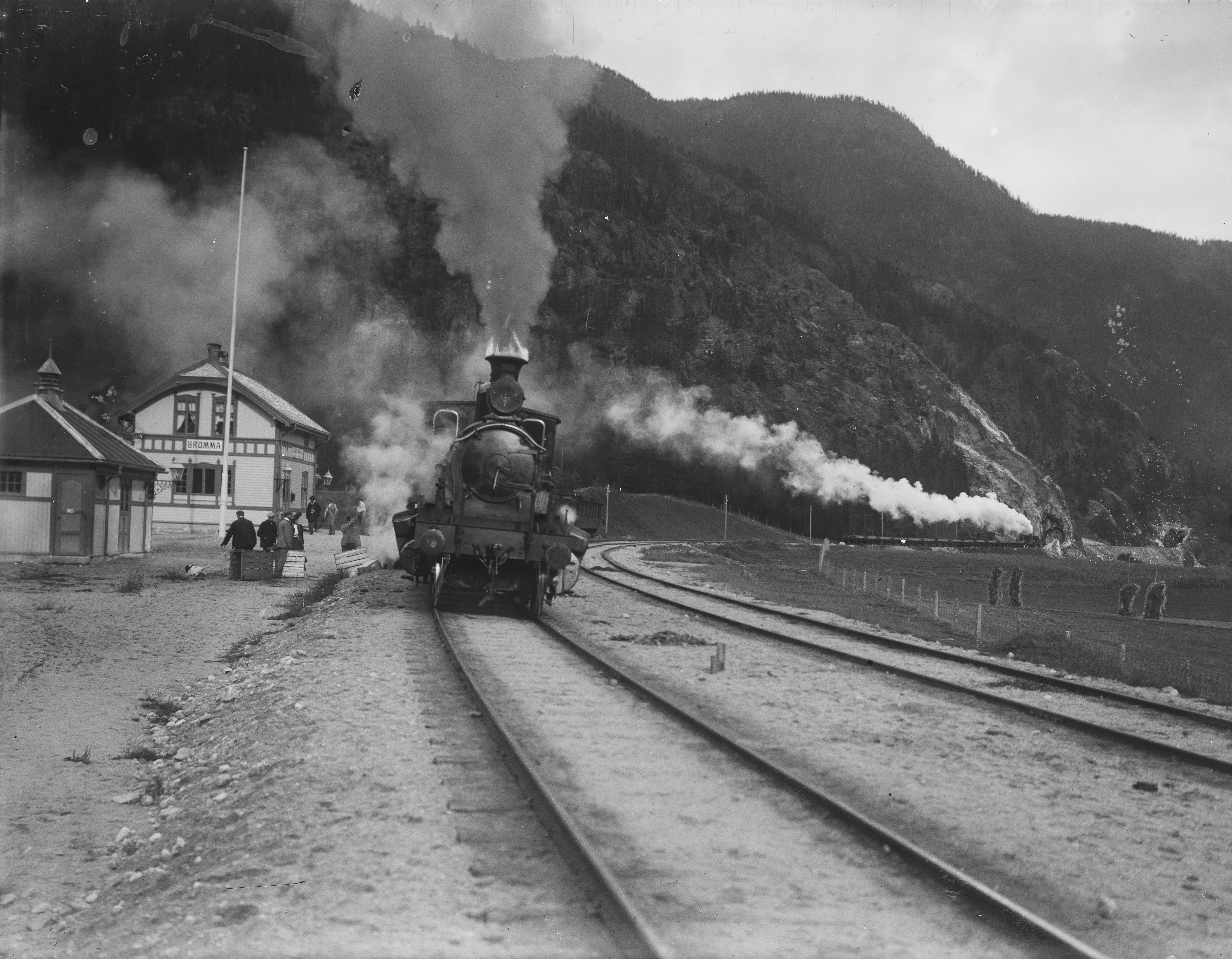 Bromma stasjon på Bergensbanen. Foto: Narve Skarpmoen, fra Nasjonalbibliotekets samling.